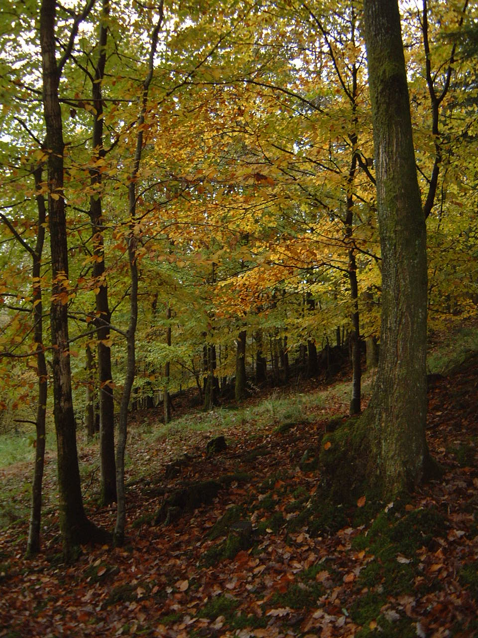 Quercus petraea